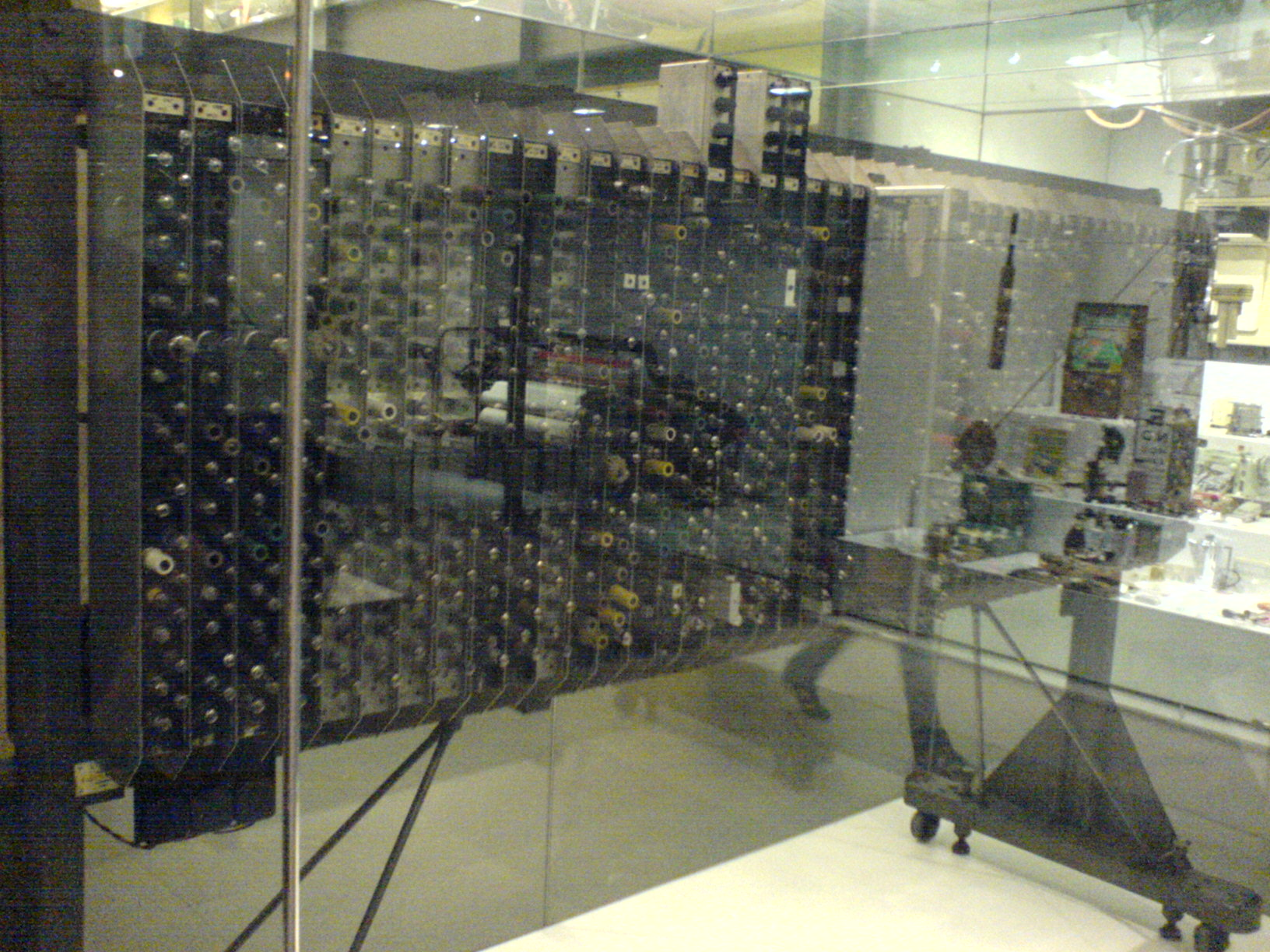 Pilot ACE Vacuum tube computer :o